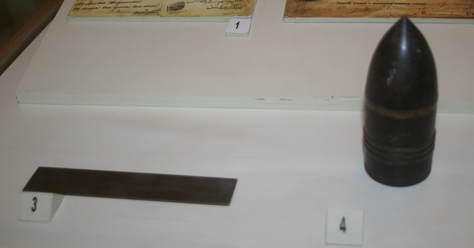 Линейка и подаренный Посольством России в Стамбуле снаряд Ибрагим-ага Векилова